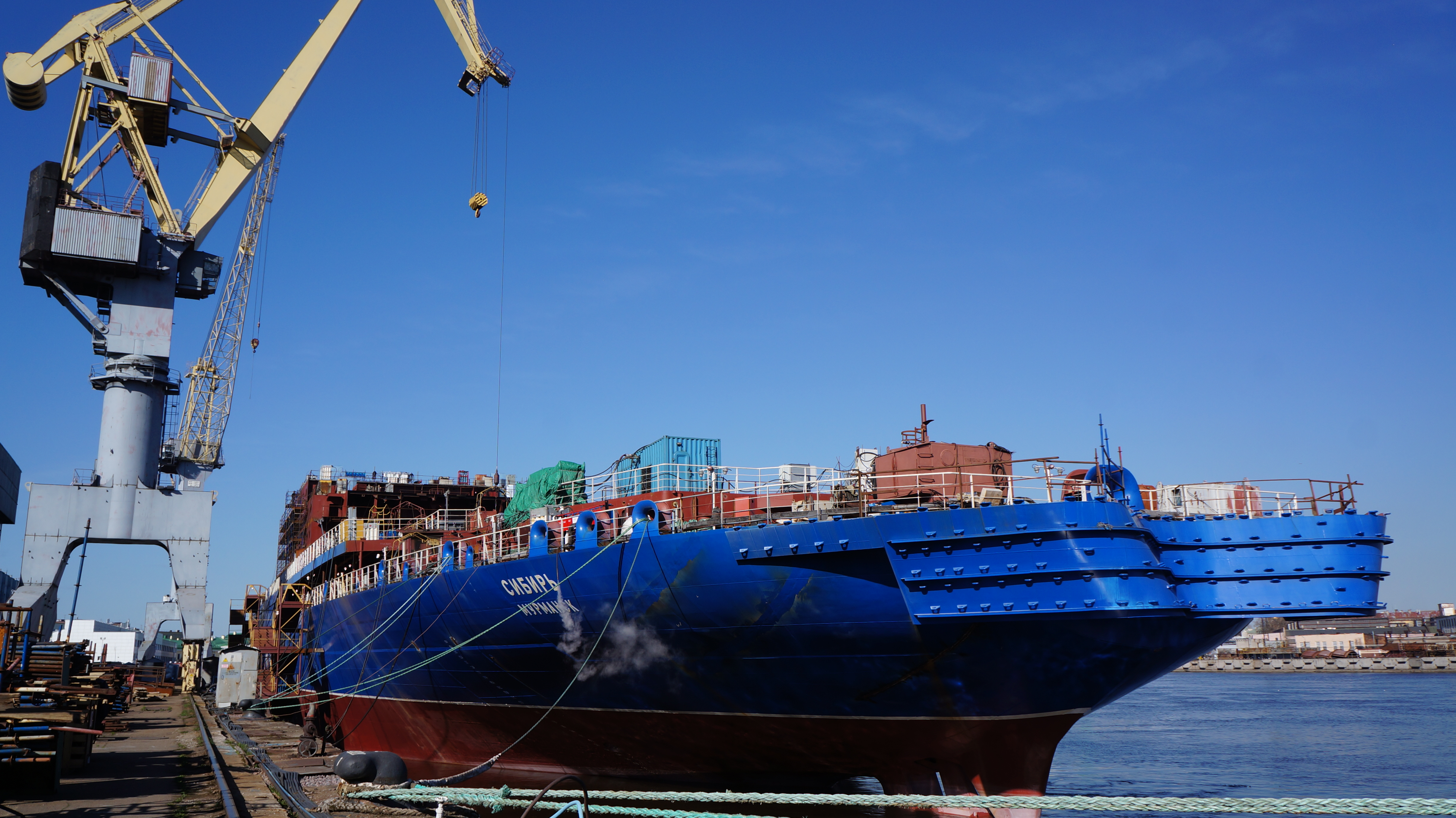 Ледокол «Сибирь» — атомный ледокол проекта 22220 типа ЛК-60Я (второе судно проекта, после «Арктики»)